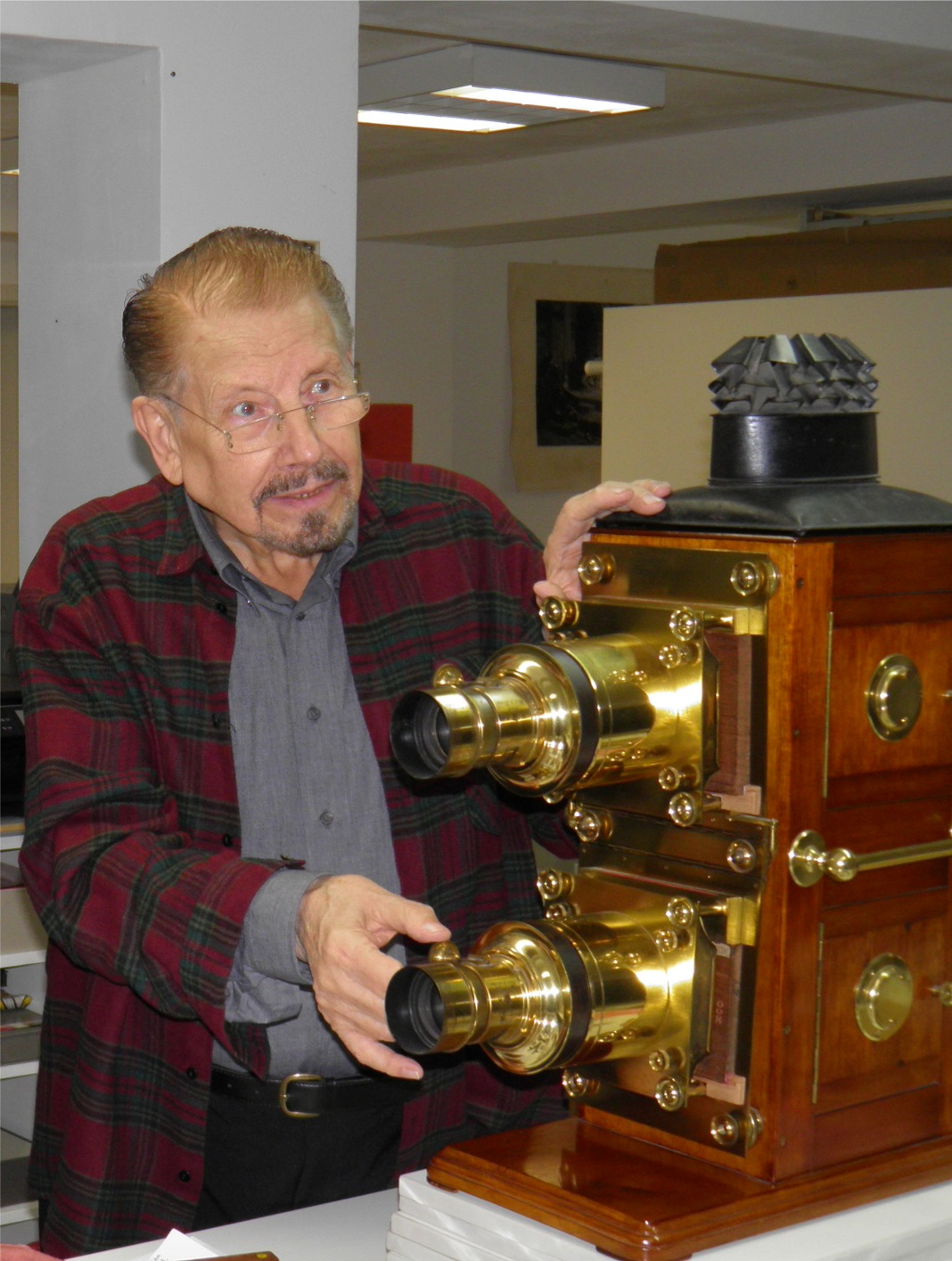 Laterna Magica eines Sammlers aus Belgien bei Vorführung in Remscheid-Lennep